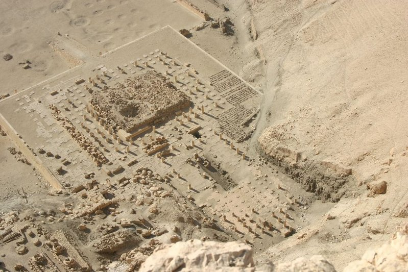 Immagine proveniente da wiki rilasciata sotto